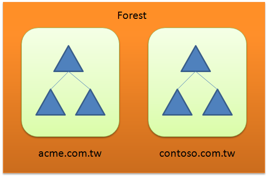 Active Directory 森林範例。